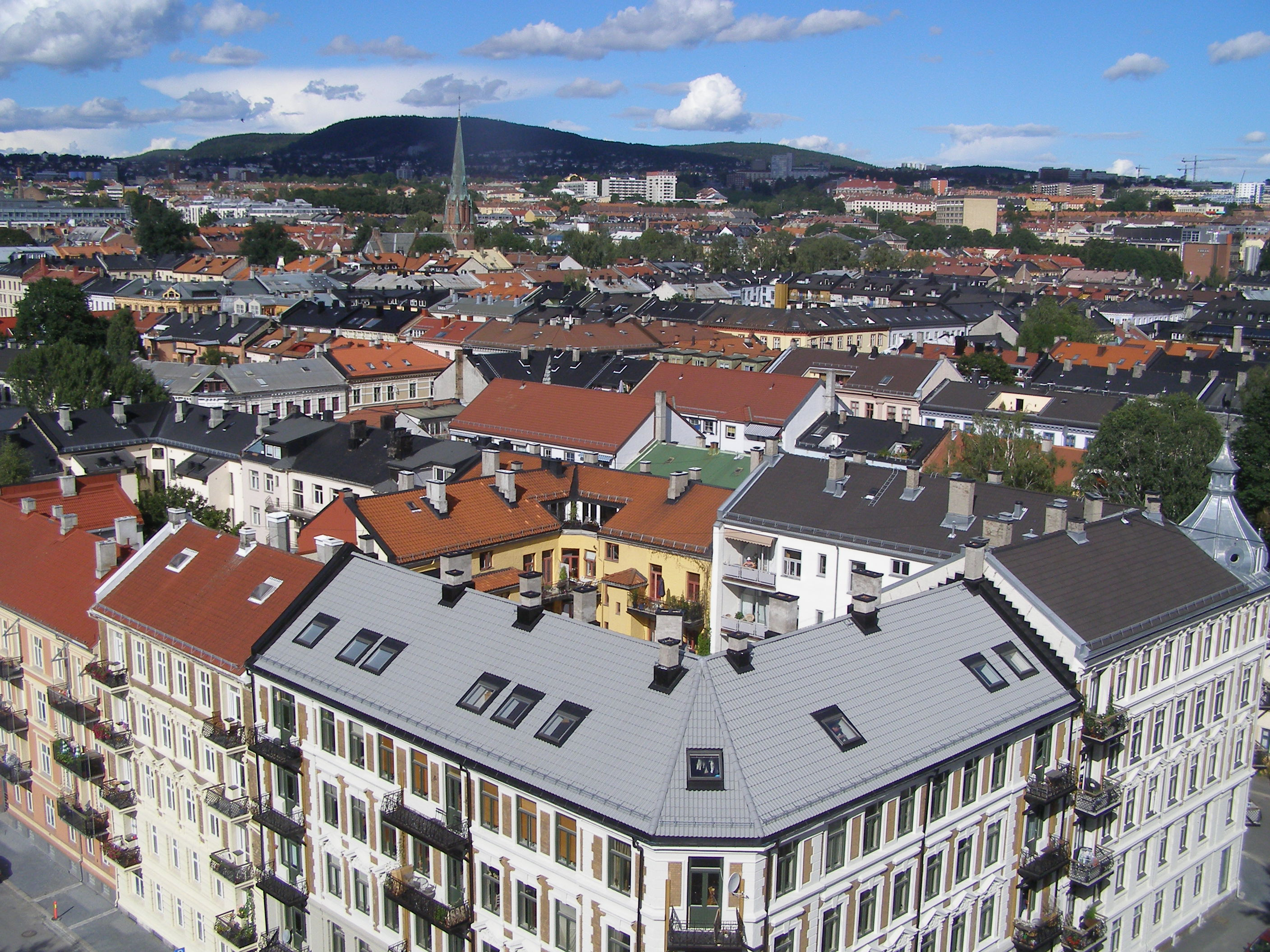 Utsikt fra «Siloen» (Marselis gate 24) mot nordøst over Grünerløkka